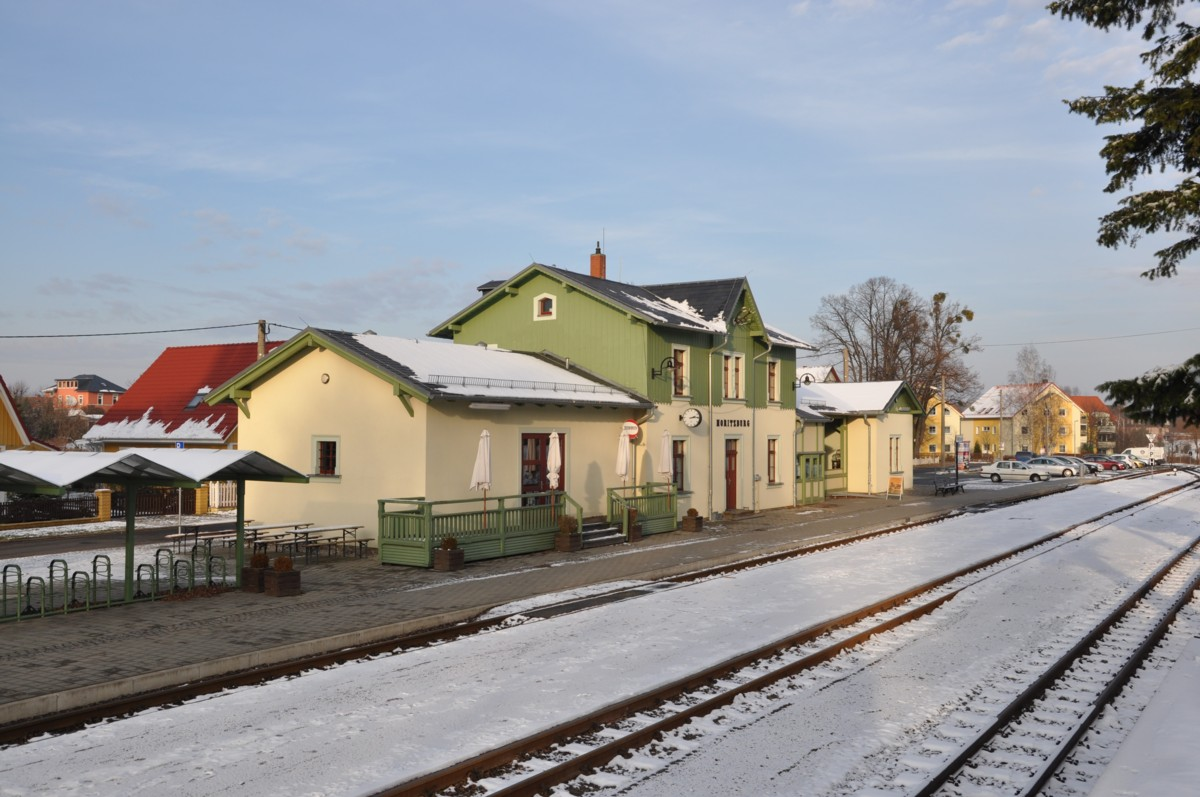 Bahnhof Moritzburg der Lößnitzgrunbahn